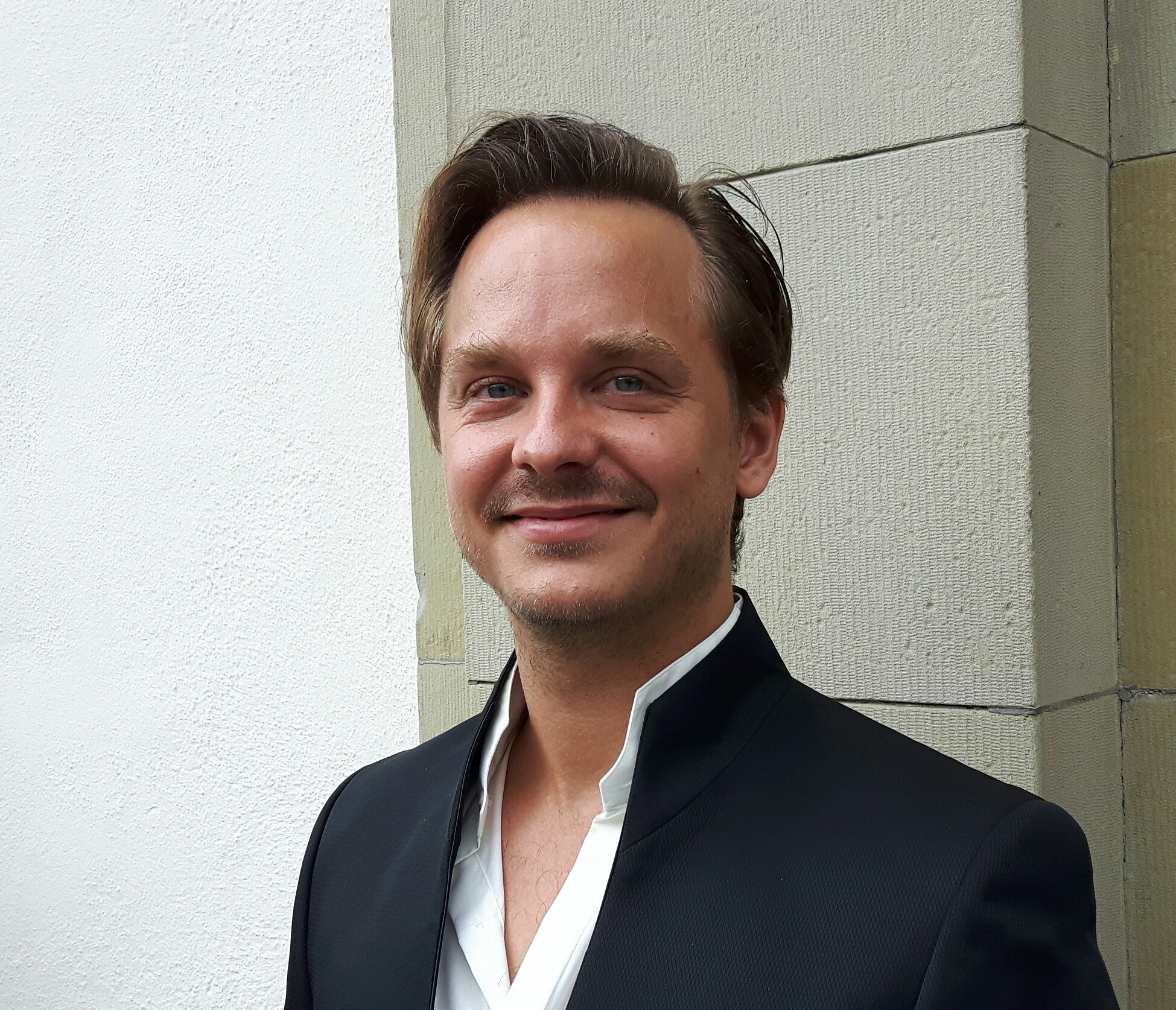 Henrik Måwe vid Östergötlands musikdagar 2017 i Linköping.